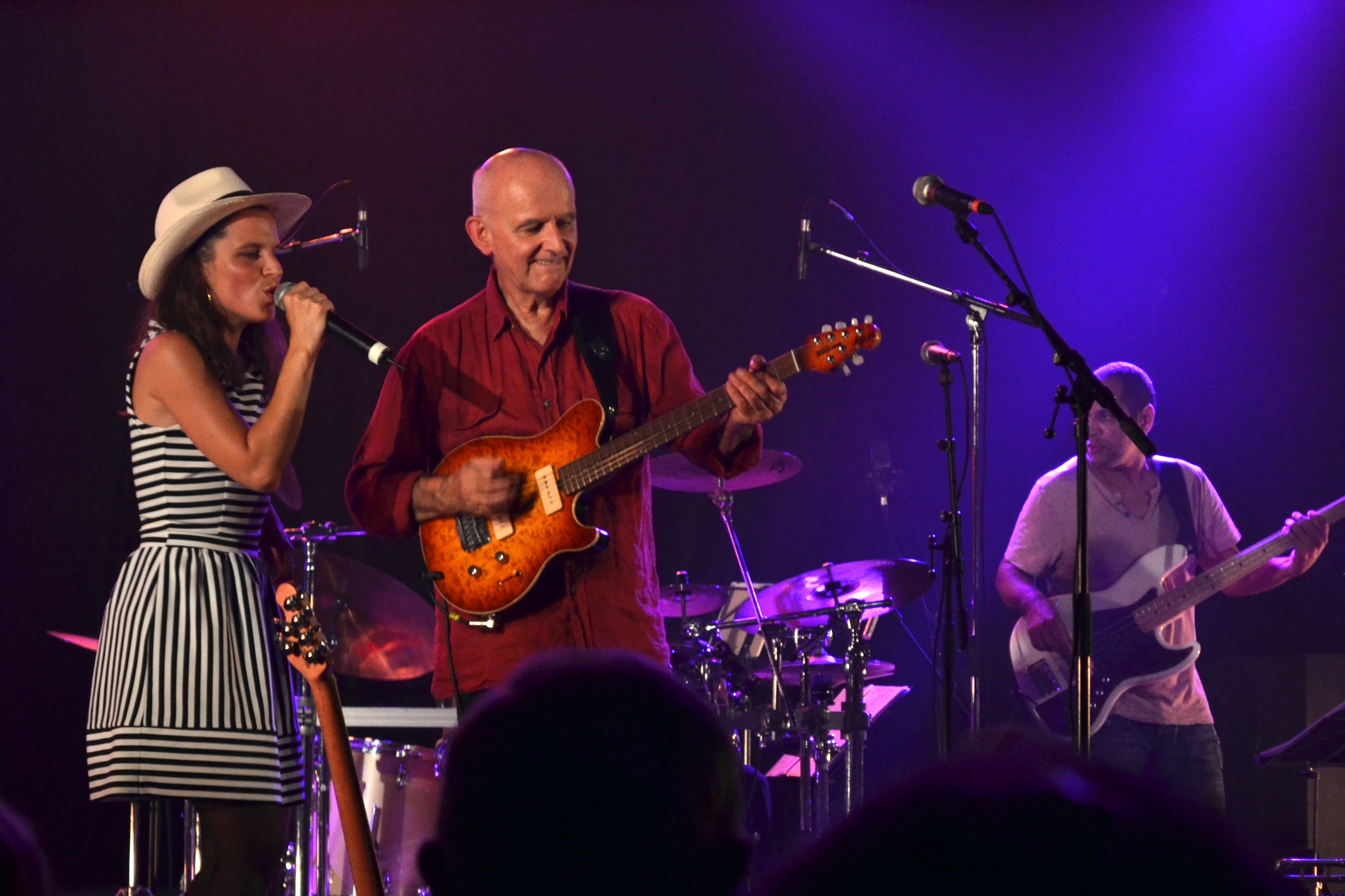 Clarisse Lavanant pour le spectacle Célébration de Dan Ar Braz à l'occasion de la Jap'Noz à Plouider le 17 août 2013.